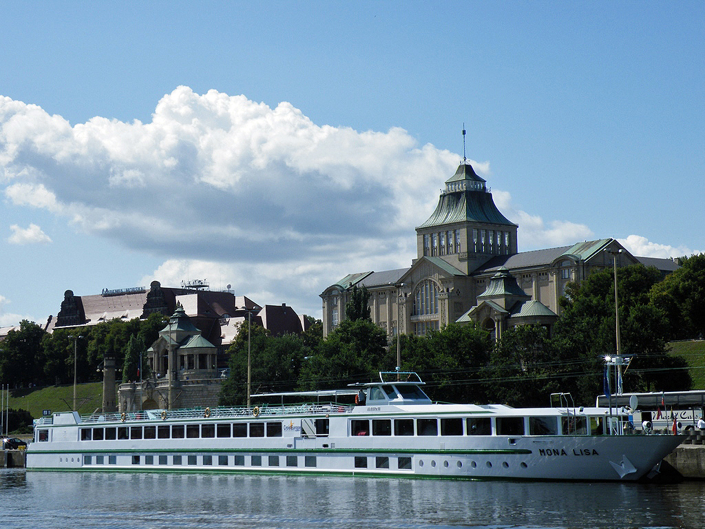 Kabinenschiff Mona Lisa vor den Hafenterassen in Szczecin.